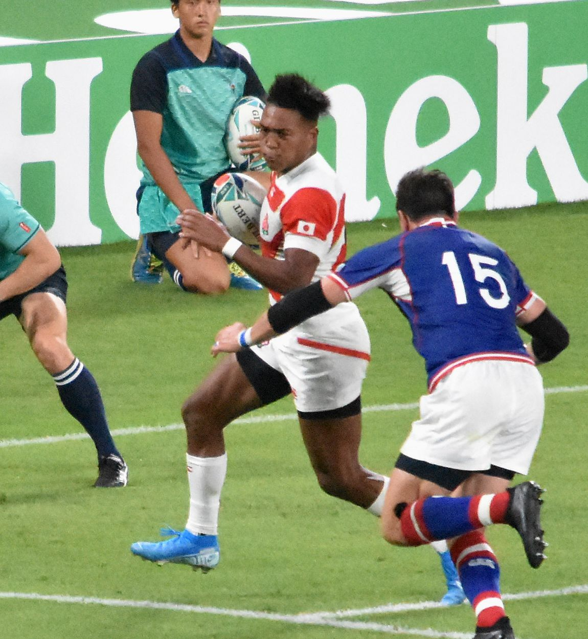 松島幸太朗